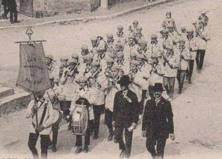 La société des bigophones de Bruère-Allichamps défile près de la colonne Centre France.